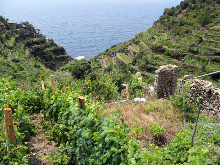 Parco nazionale delle Cinque Terre, Italy